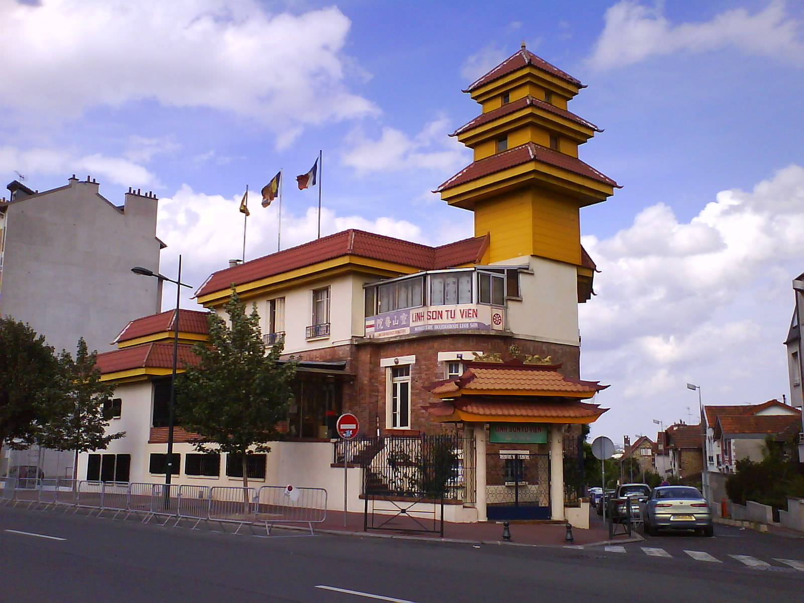 Temple bouddhique Linh Son à Joinville-le-Pont, France